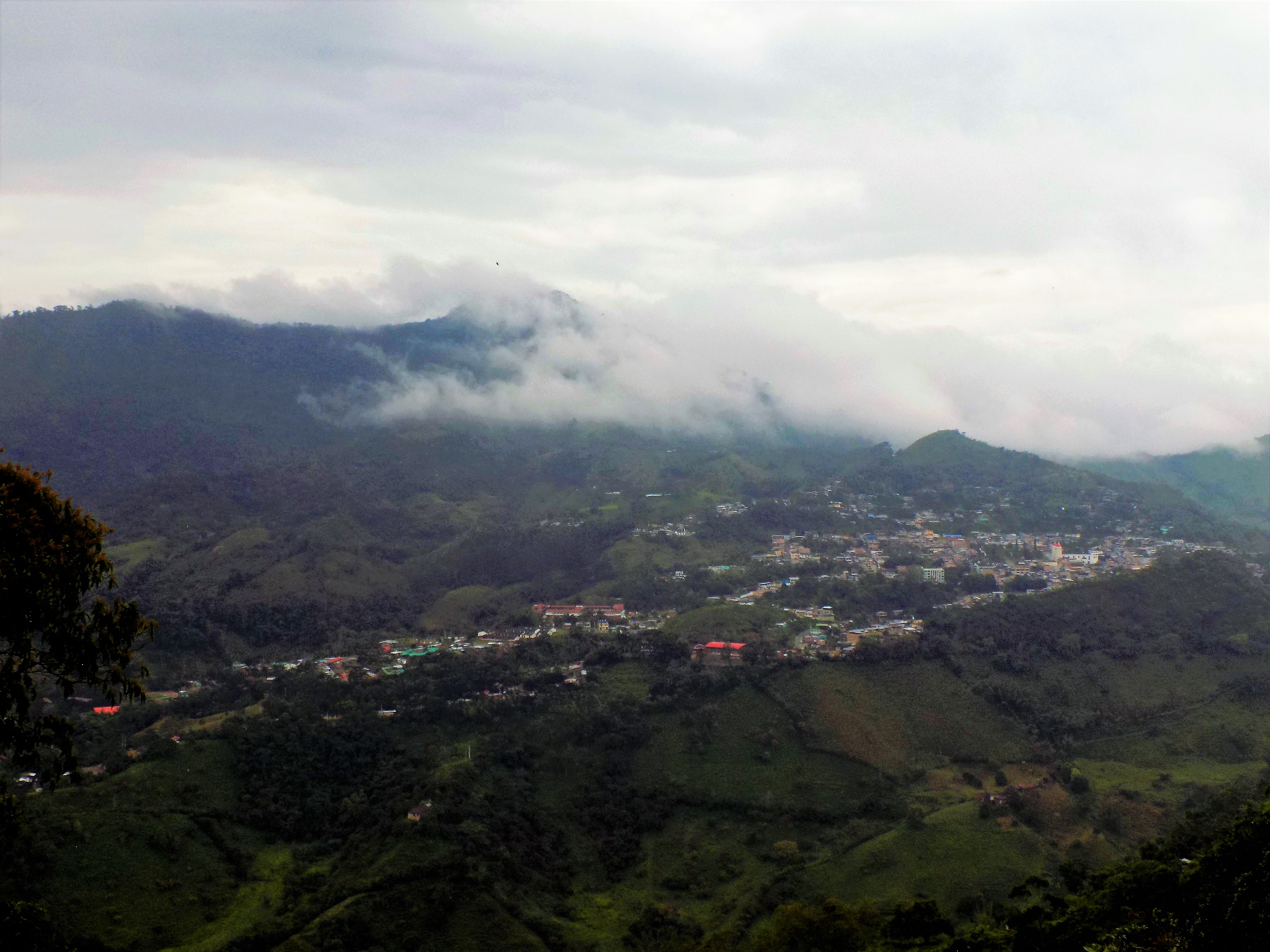 La falta de infraestructura vial dentro del territorio municipal es la principal dificultad a la que se enfrenta el campesinado a la hora de transportar sus productos para comercializarlo, la gran mayoría de las veredas no cuentan con vías adecuadas para el desplazamiento de veículos de carga pesada o automóviles, por esta razón los pobladores opta por la motocicleta, los animales de carga (caballos y/o mulas) o la caminata.